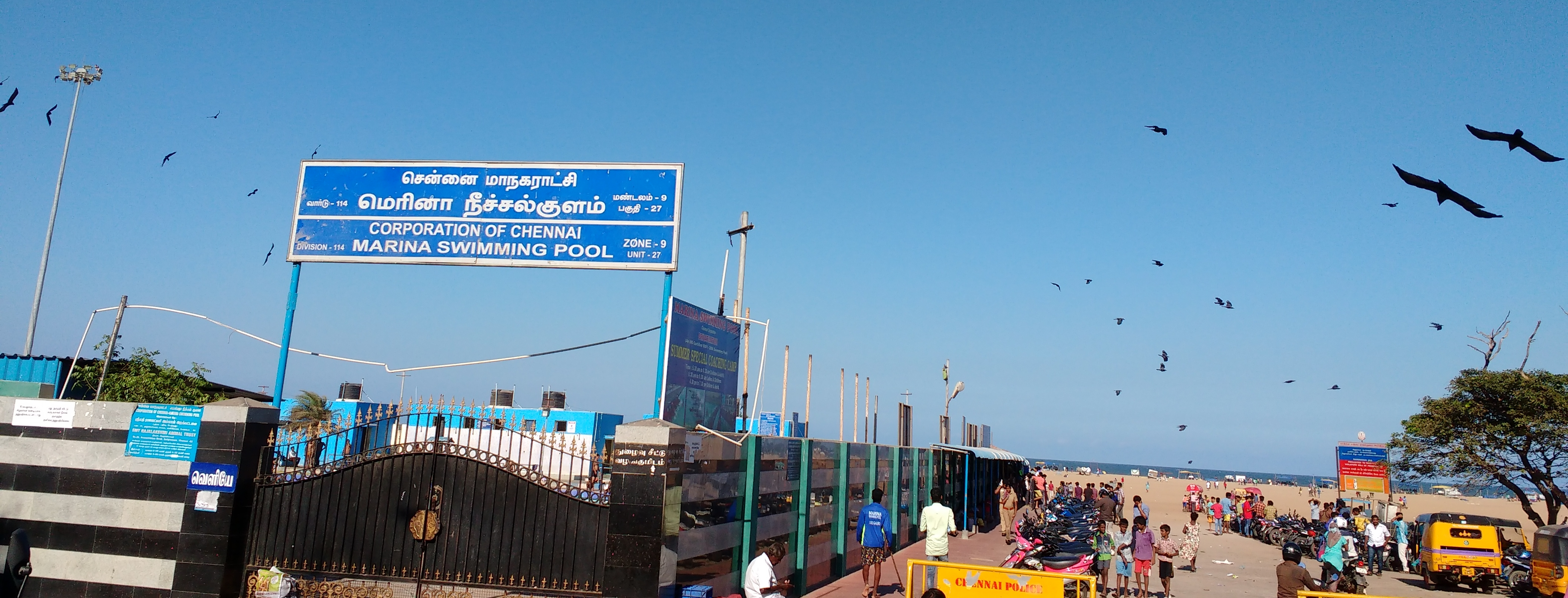 மெரினா நீச்சல் குளம் சென்னை